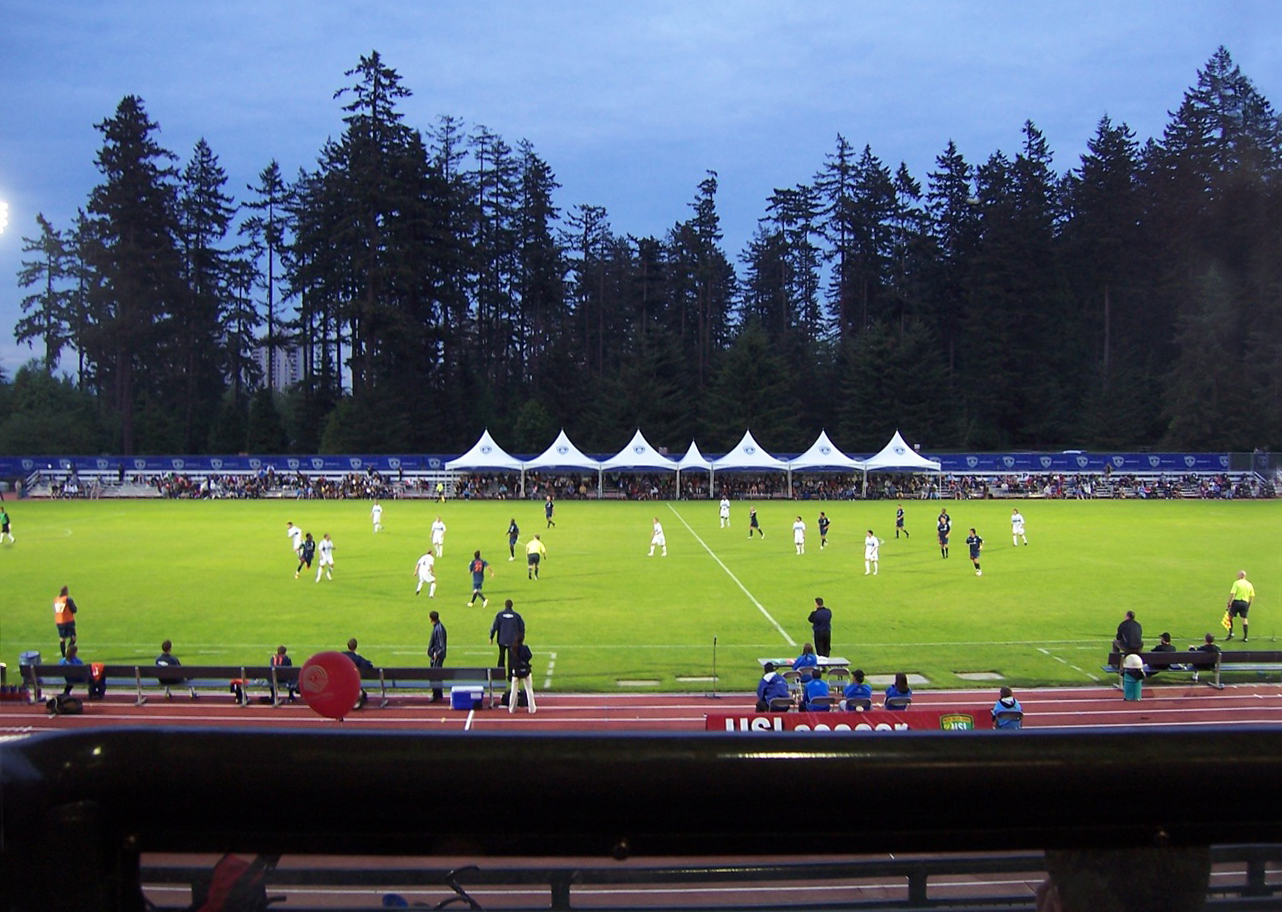 left vs. right. the eternal struggle.